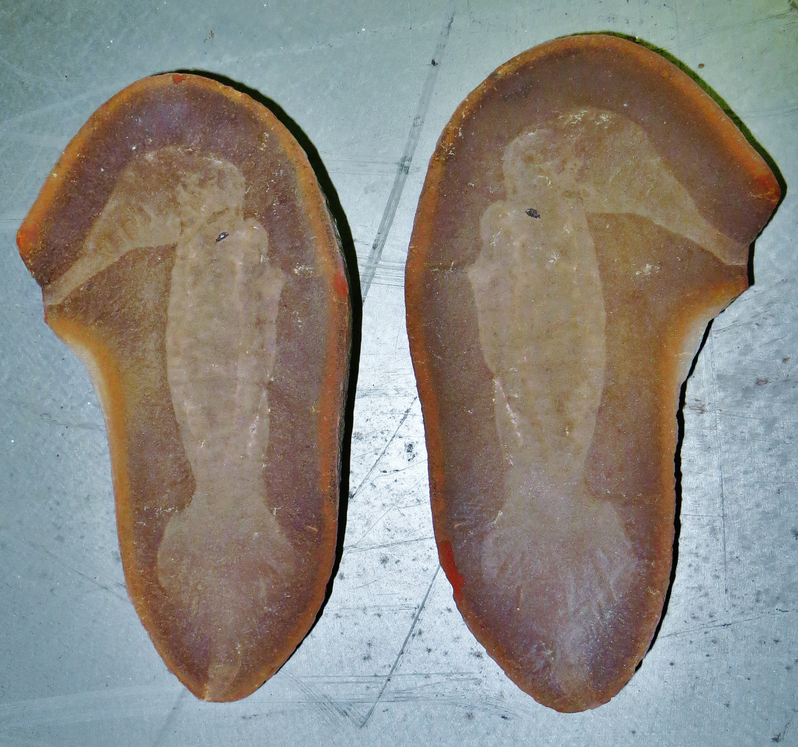 Fossil of Tullimonstrum- Took the picture at Museo di Storia Naturale di Milano